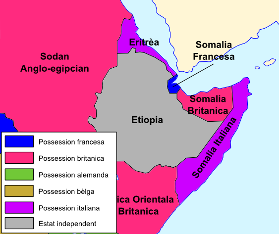 Partiment de Somalia en 1914.